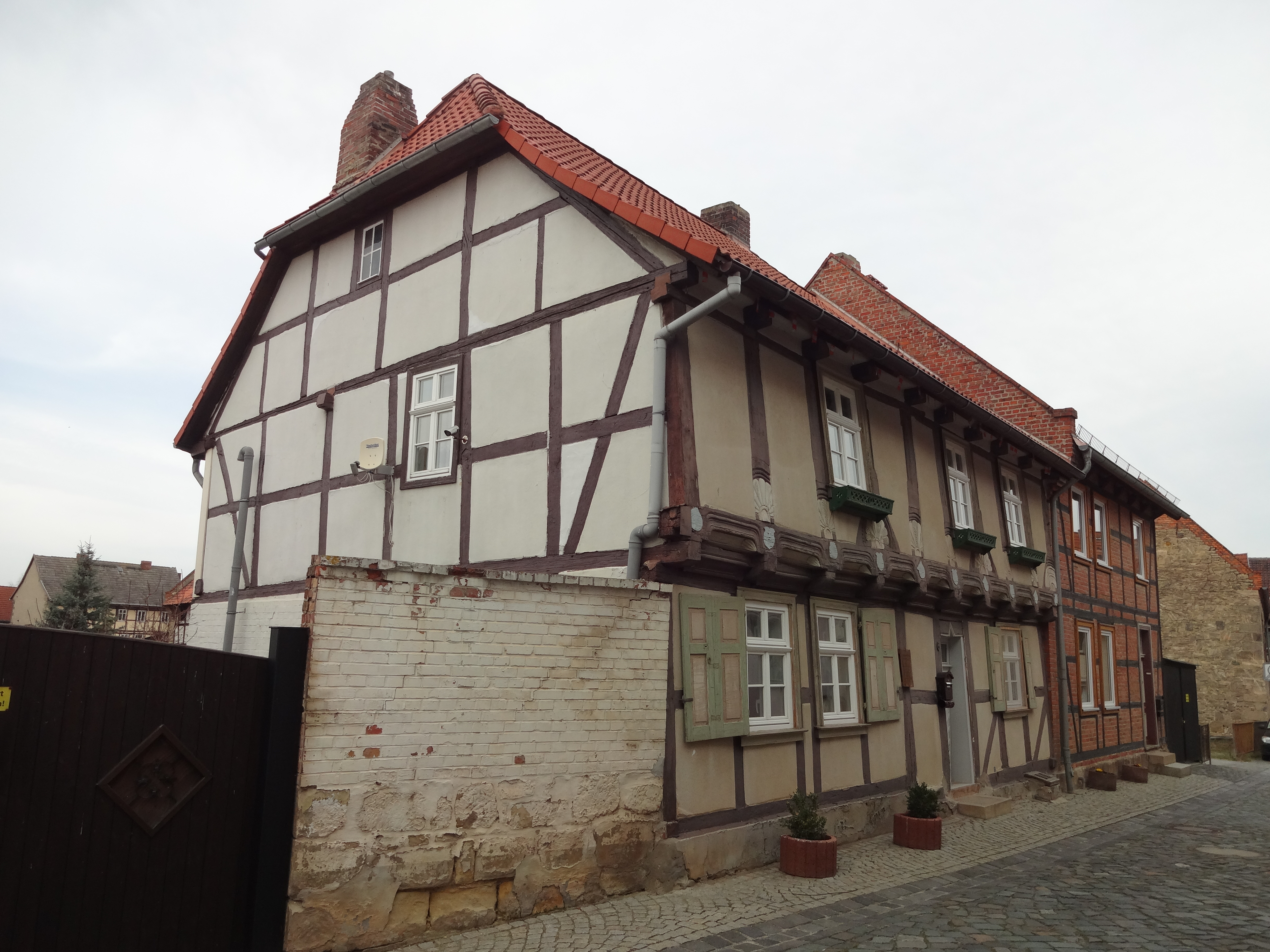 denkmalgeschütztes Fachwerkhaus in der Bockstraße 6 in Derenburg, Ortsteil von Blankenburg (Harz)